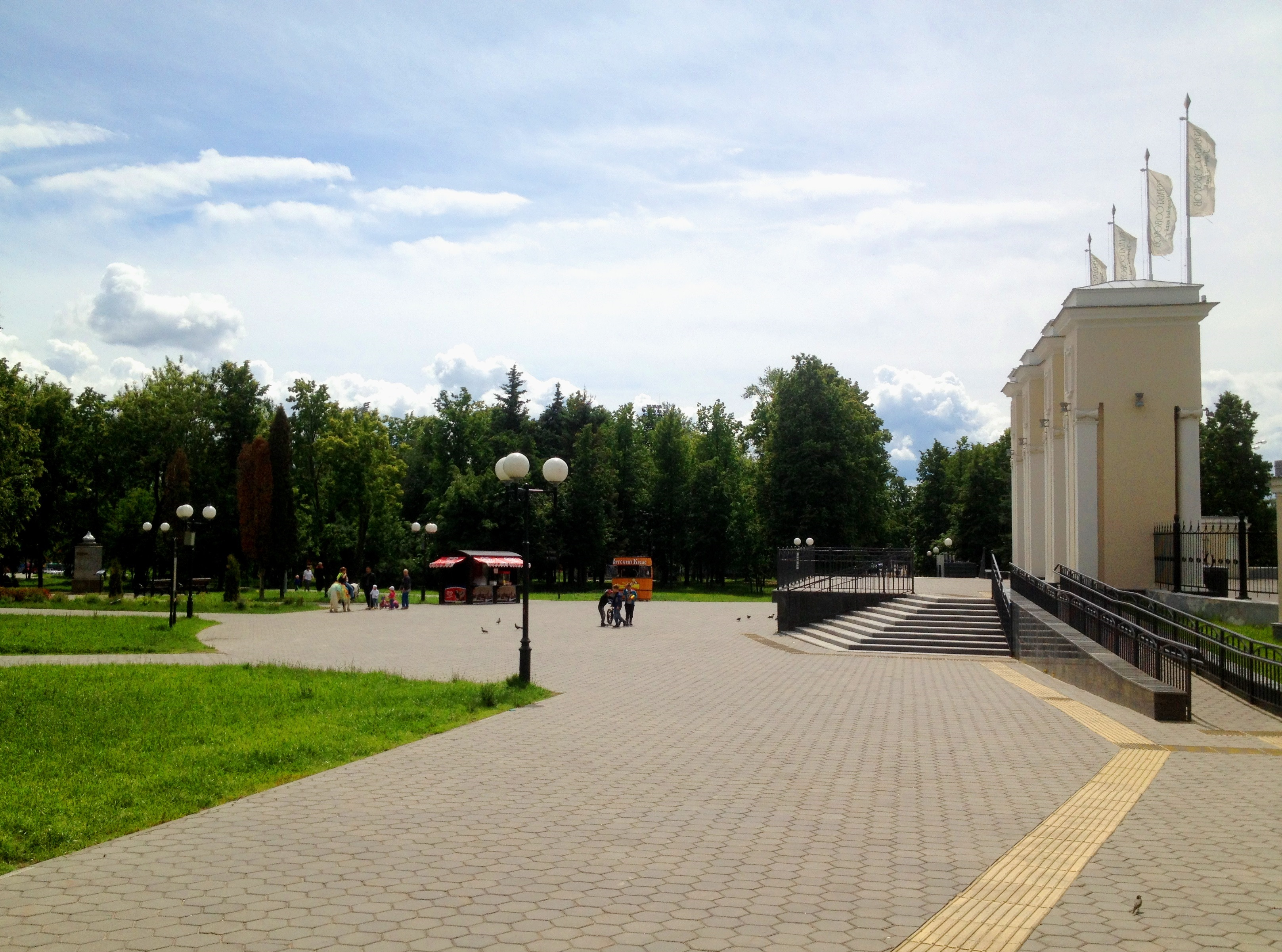 Парк "Крылья Советов" (центральный вход) (г. Казань).